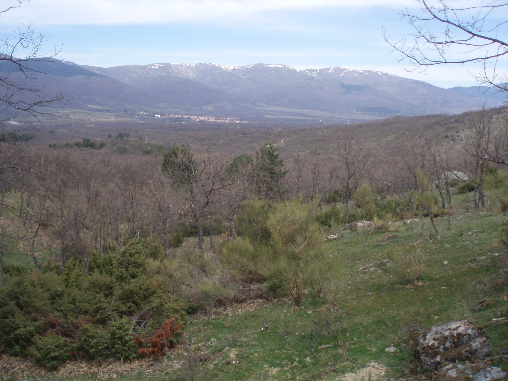 Valle del Lozoya (Sierra de Guadarrama, España).